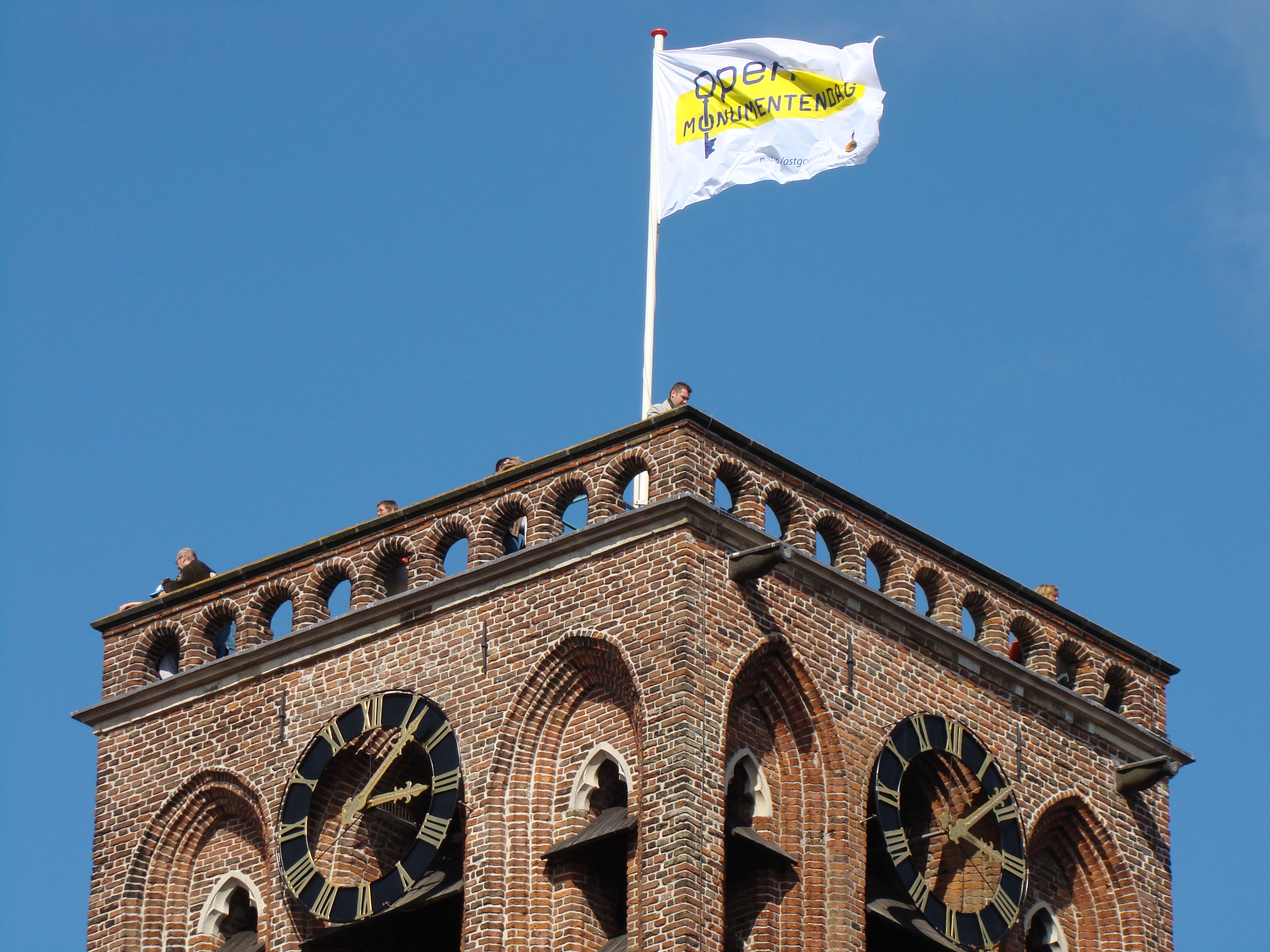 Flags of the Netherlands